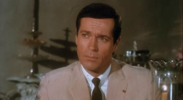 Frederick Stafford dans la bande-annonce du film Topaz en 1969.